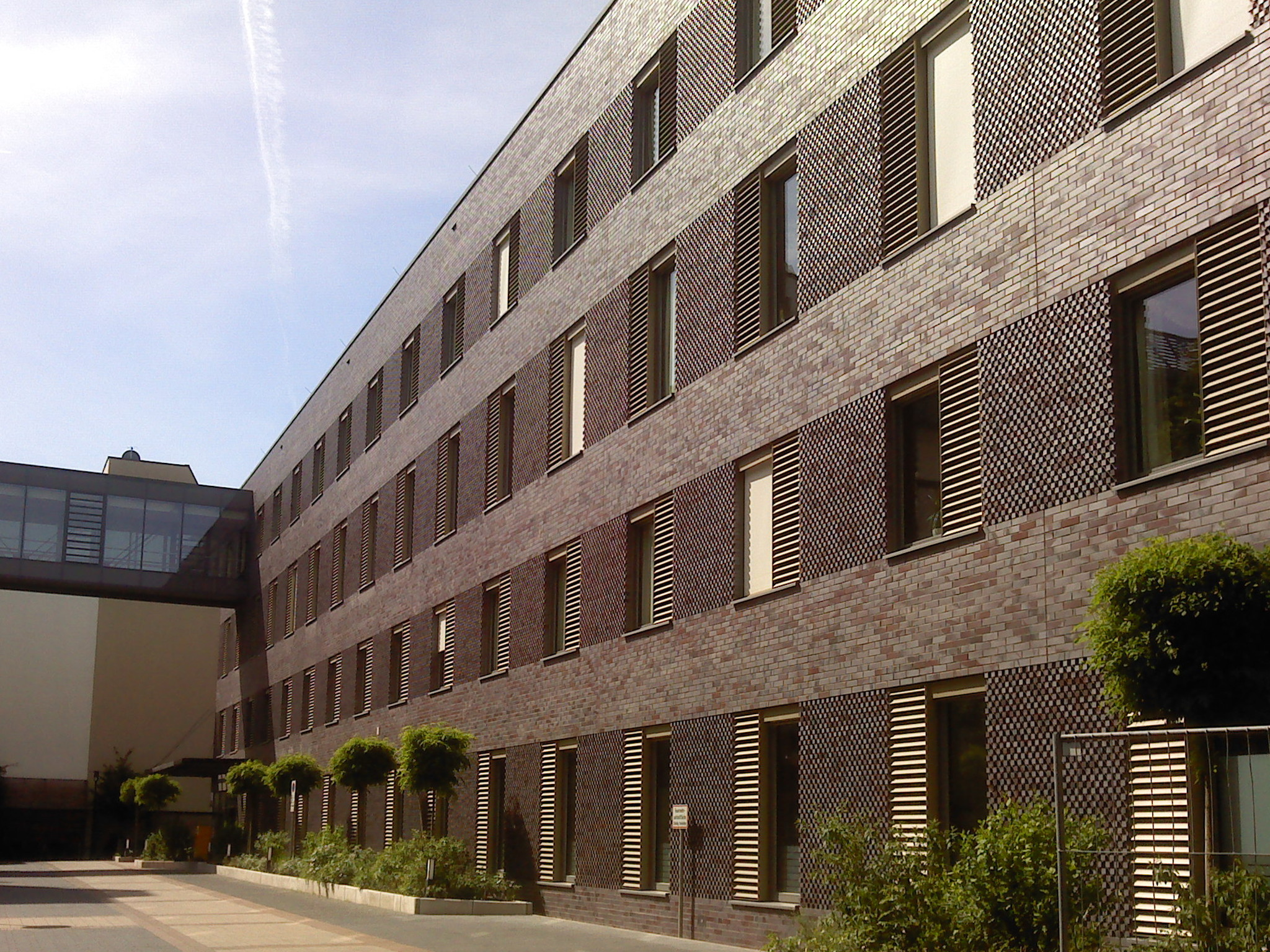 St. Hedwig-Krankenhaus: Haus Vinzenz von Paul